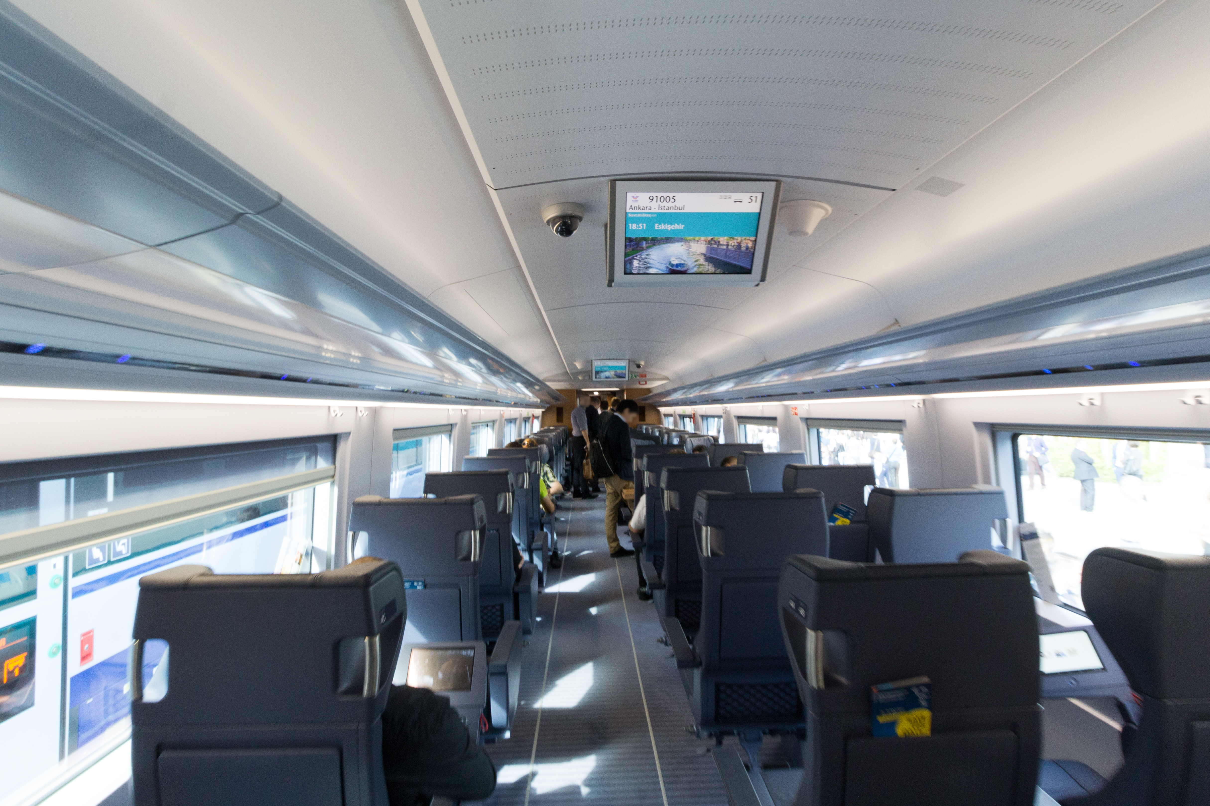 InnoTrans 2016 - TCDD HT 80000 - Siemens Velaro TR